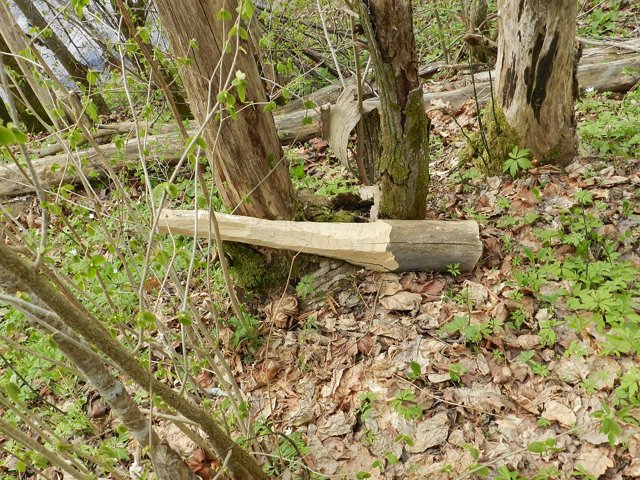 Колотушка для забивания столбиков закола, оставленная на берегу реки